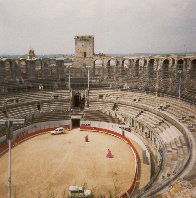 La arena romana de Arles Arles, France: Amphitheatre